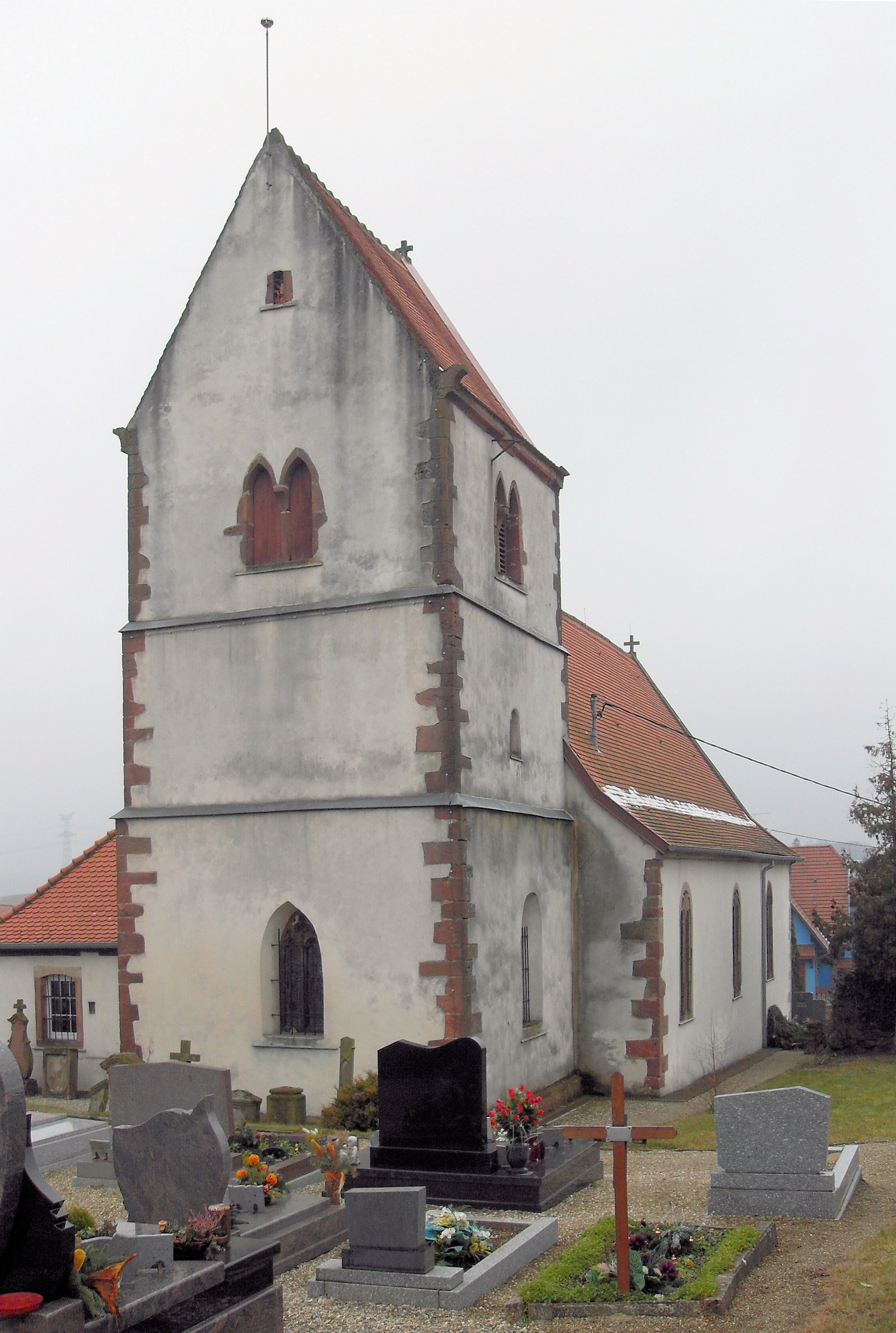 L'église Saint-Remi à Singrist